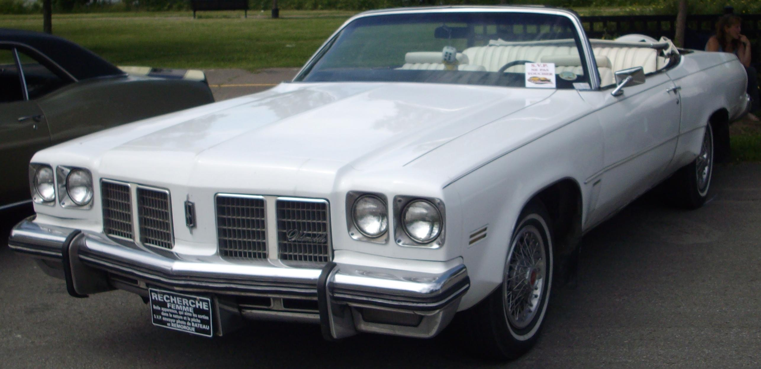 1975 Oldsmobile Delta 88 Royale Convertible photographed in Montréal, Quebec, Canada at Bagnoles au bord de l'eau 2012.